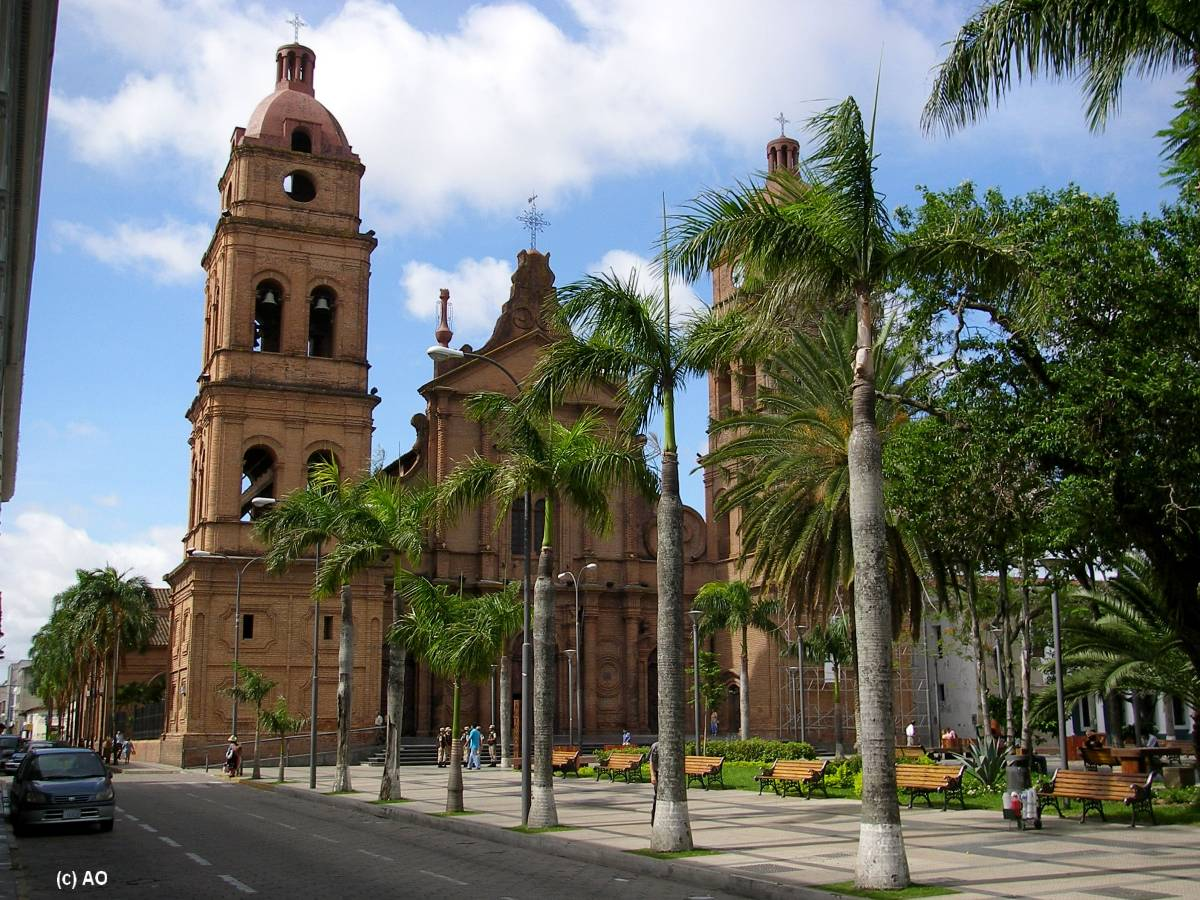 Plaza 24 de septiembre